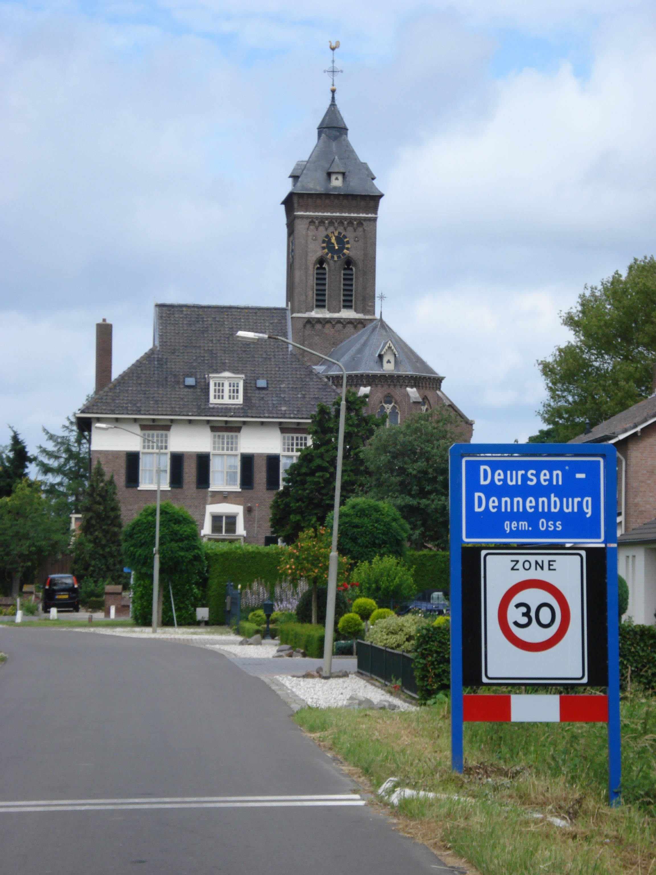 Deursen-Dennenburg, à Deursen: l'eglise